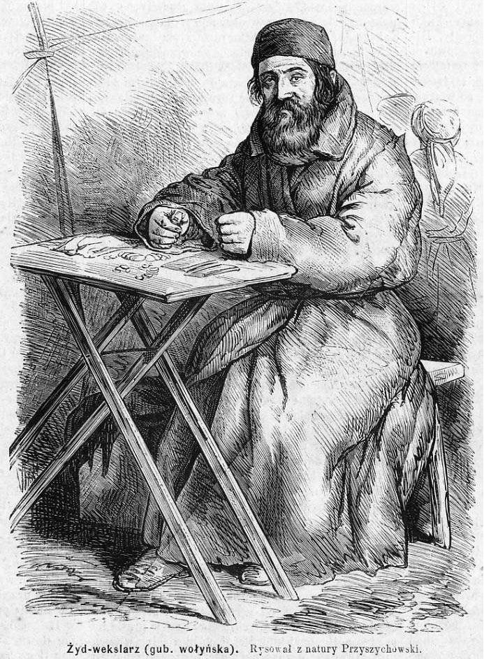 Єврей з Волинської губернії, 2 пол. 19 ст.